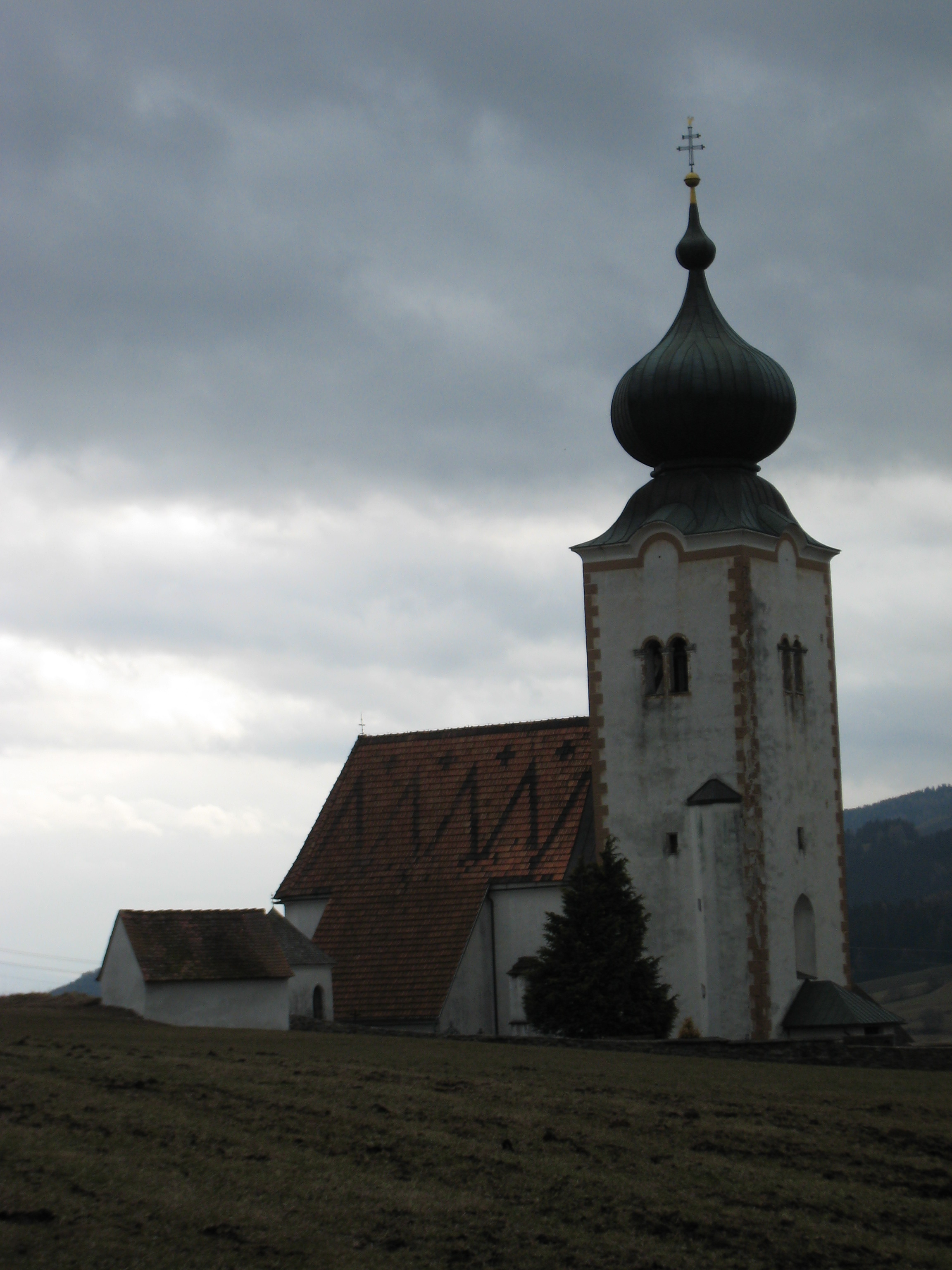 Pfarrkirche St. Peter und Paul in Reichefels